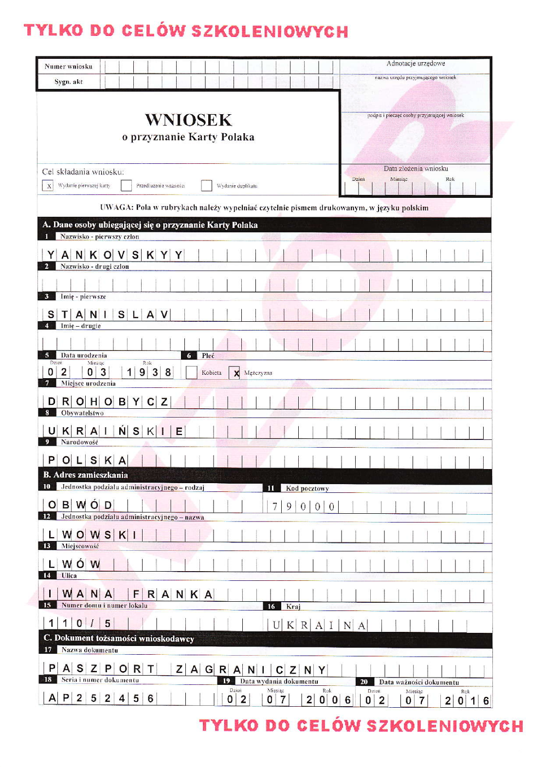 Wzór prawidłowo wypełnionego wniosku o przyznanie Karty Polaka, strona nr 1/2. Wzór wniosku został ogłoszony w rozporządzeniu Rady Ministrów z dnia 4 marca 2008 r. w sprawie określenia wzoru wniosku o przyznanie Karty Polaka oraz wzoru Karty Polaka (Dz. U. z 2008 r. Nr 48, poz. 282}. Wzór prawidłowo wypełnionego wniosku pochodzi ze strony Konsulatu Generalnego Rzeczypospolitej Polskiej we Lwowie. Aby na Karcie Polaka umieszczono nazwisko według polskiej pisowni, należy umieścić je w polu nr 1 przed nazwiskiem z dokumentu tożsamości, oddzielając je ukośnikiem, np. Kostecki / Kostetskyi. Na podpis może składać się zarówno nazwisko jak i imię oraz nazwisko.